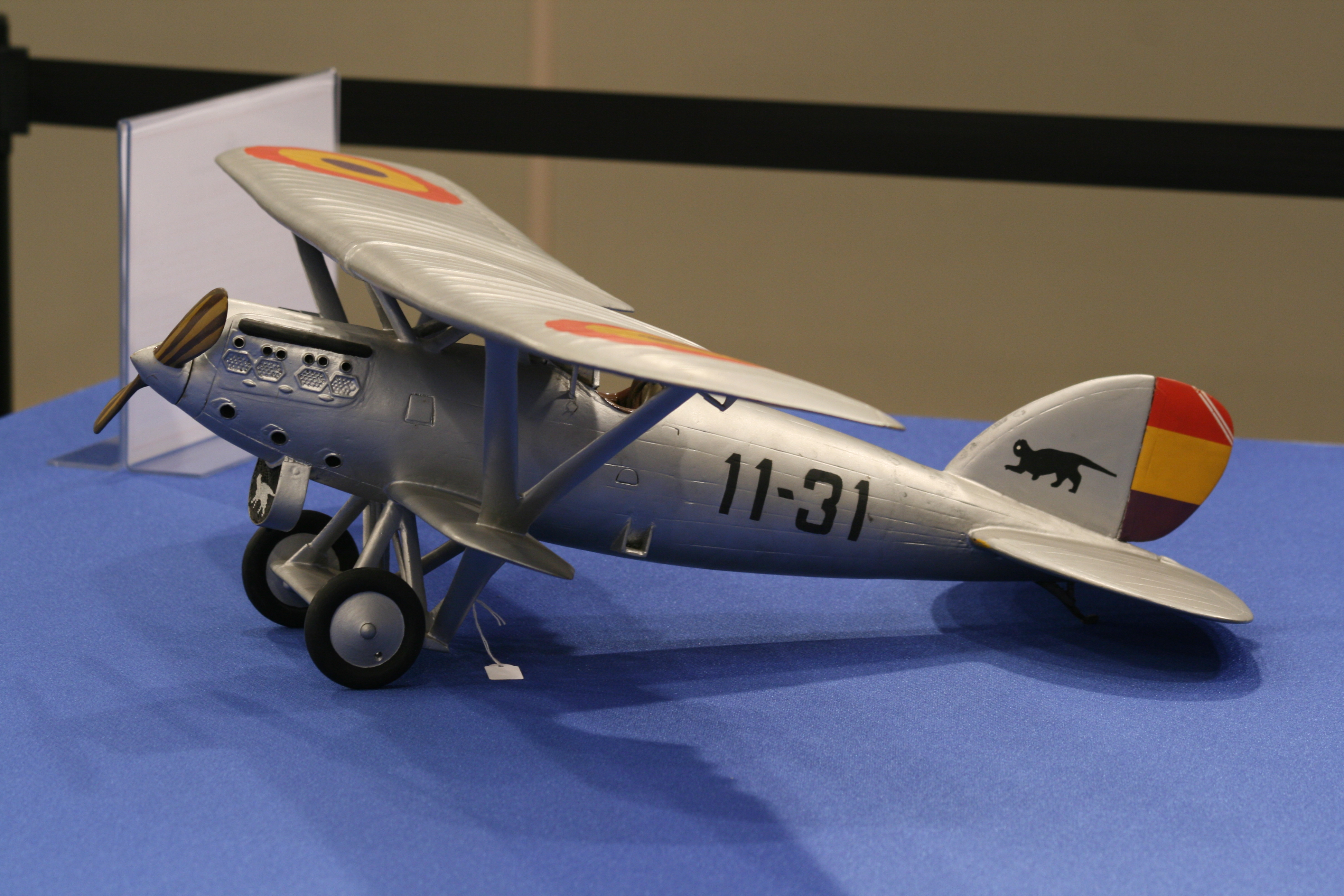 Caza Nieuport-Delage NiD-52 de las Fuerzas Aéreas de la República Española. Combatió en el bando republicano durante la Guerra Civil Española (1936-1939). Maqueta del Museo del Aire de Cuatro Vientos (Madrid) exhibida en una exposición del Ejército del Aire español en el centro comercial El Corte Inglés de Vigo (Galicia, España). Nieuport-Delage NiD-52 (1929). Fighter Nieuport-Delage NiD-52 of the Spanish Republic Air Forces. It fought in the republican band during the Spanish Civil War (1936-1939). Model of the Museum of the Air of Cuatro Vientos (Madrid) exposeed in an exhibition of the Spanish Air Army in the commercial center El Corte Inglés of Vigo (Galicia, Spain).